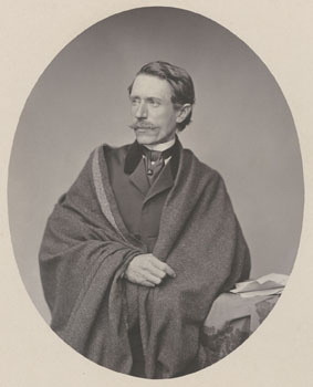 Der bayrische Reisende, Geograph und Naturforscher Moritz Wagner (1813-1887)